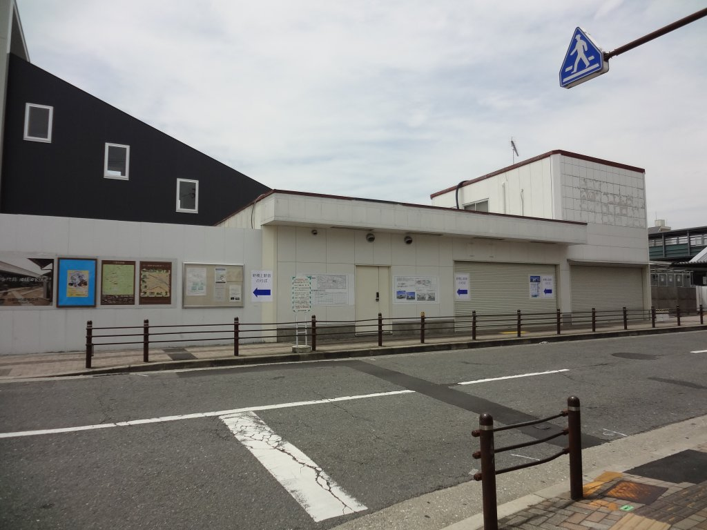 JR西日本 関西本線（大和路線） 八尾駅 仮北駅舎（使用停止翌日）